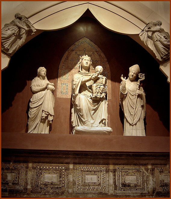 Grupo escultórico de Arnolfo di Cambio, no Museo dell'Opera di Santa Maria del Fiore, ou Opera del Duomo, Florença.